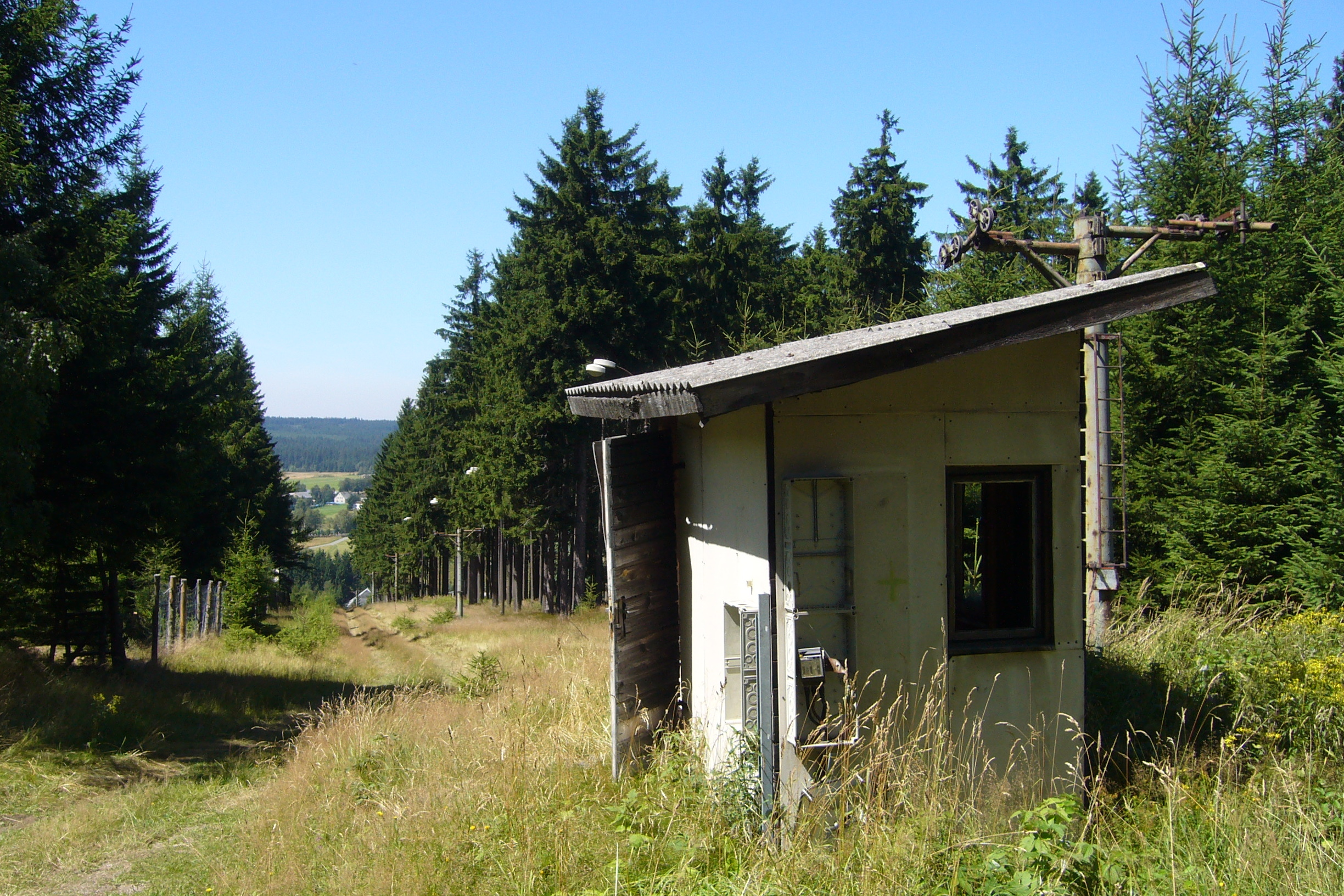 Načetín I (Kienhaid) – zchátralý lyžařský vlek